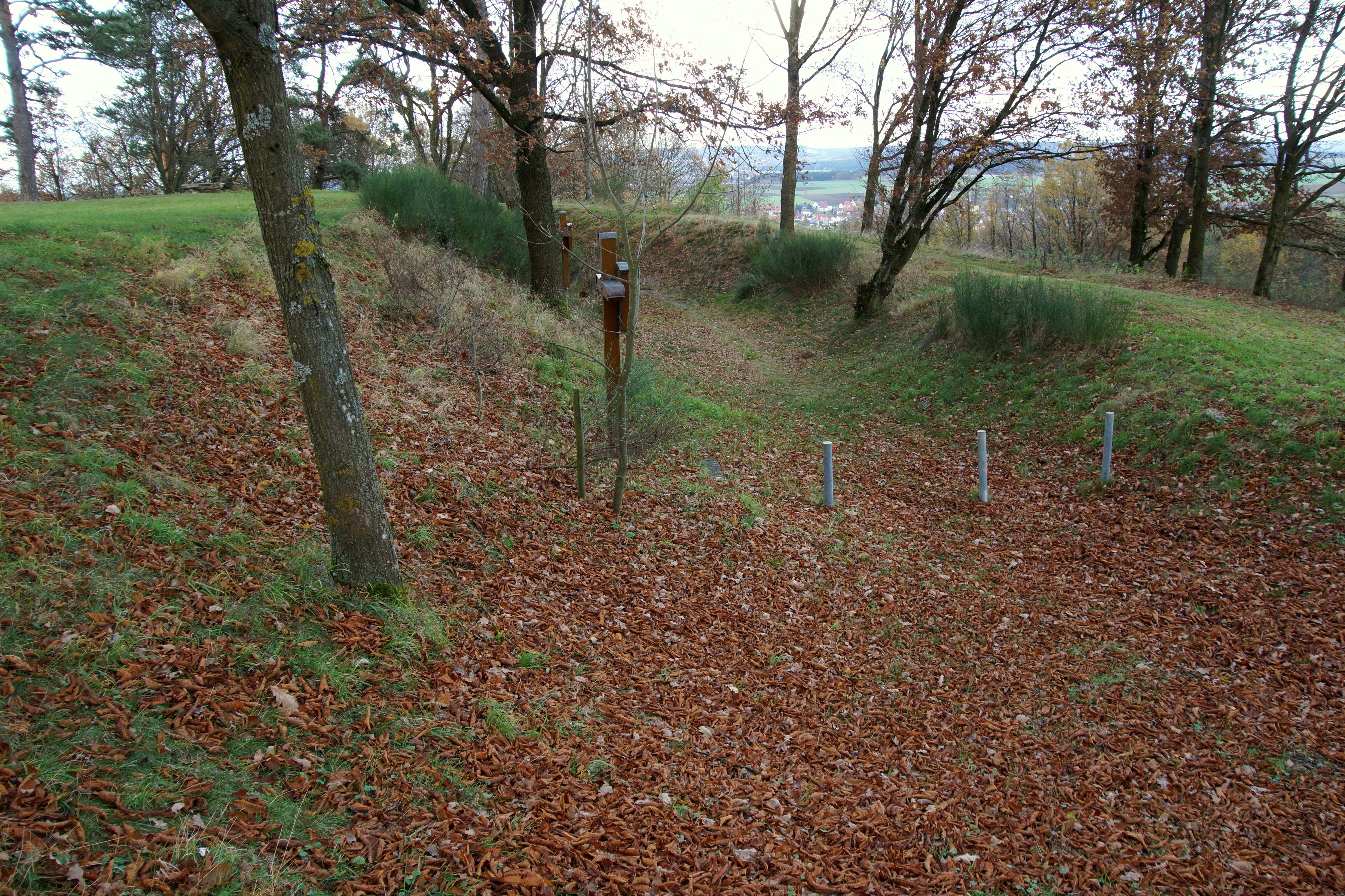 Der Möninger Berg im Westen des Oberpfälzer Landkreises Neumarkt